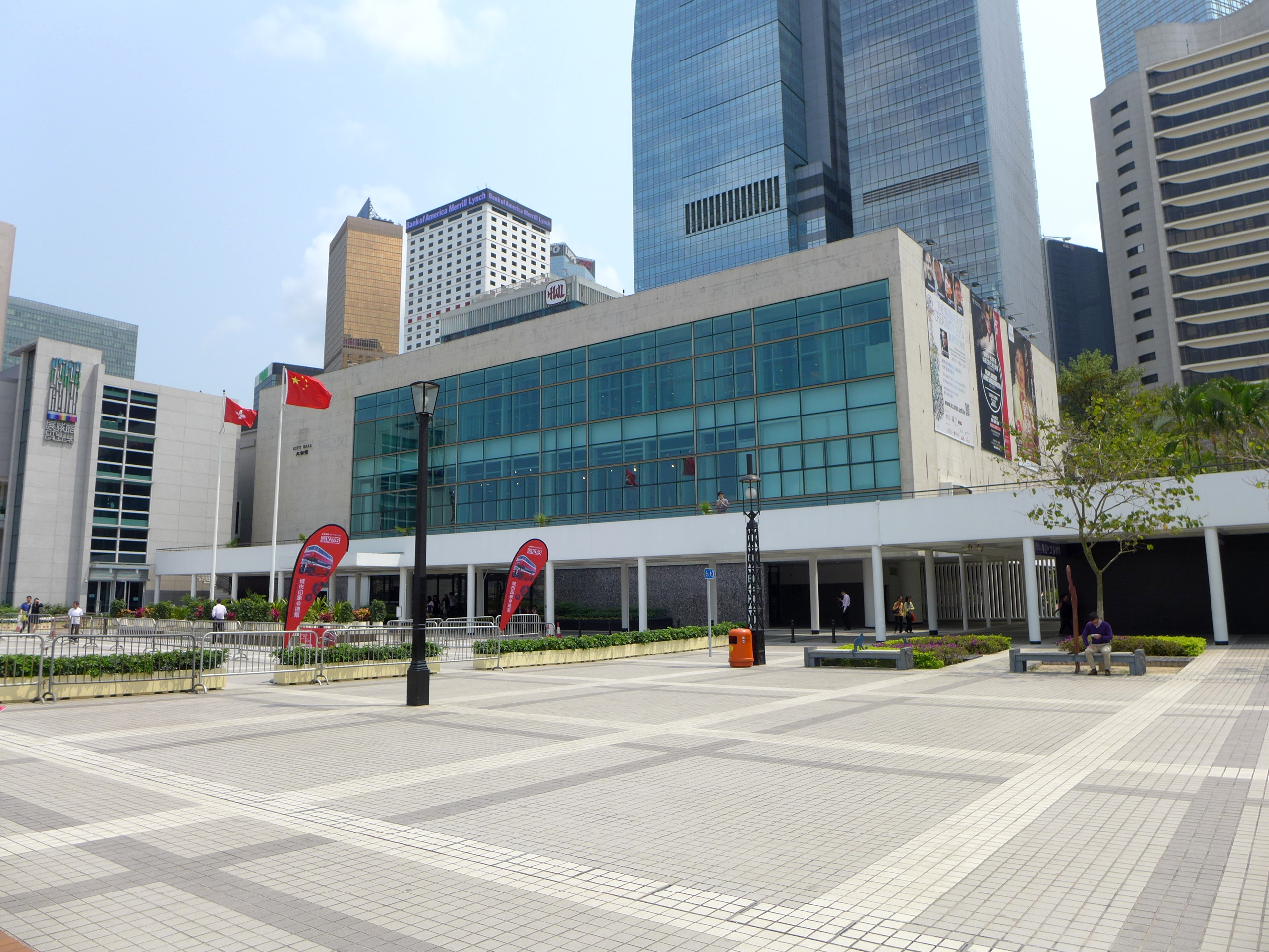 Hong Kong City Hall